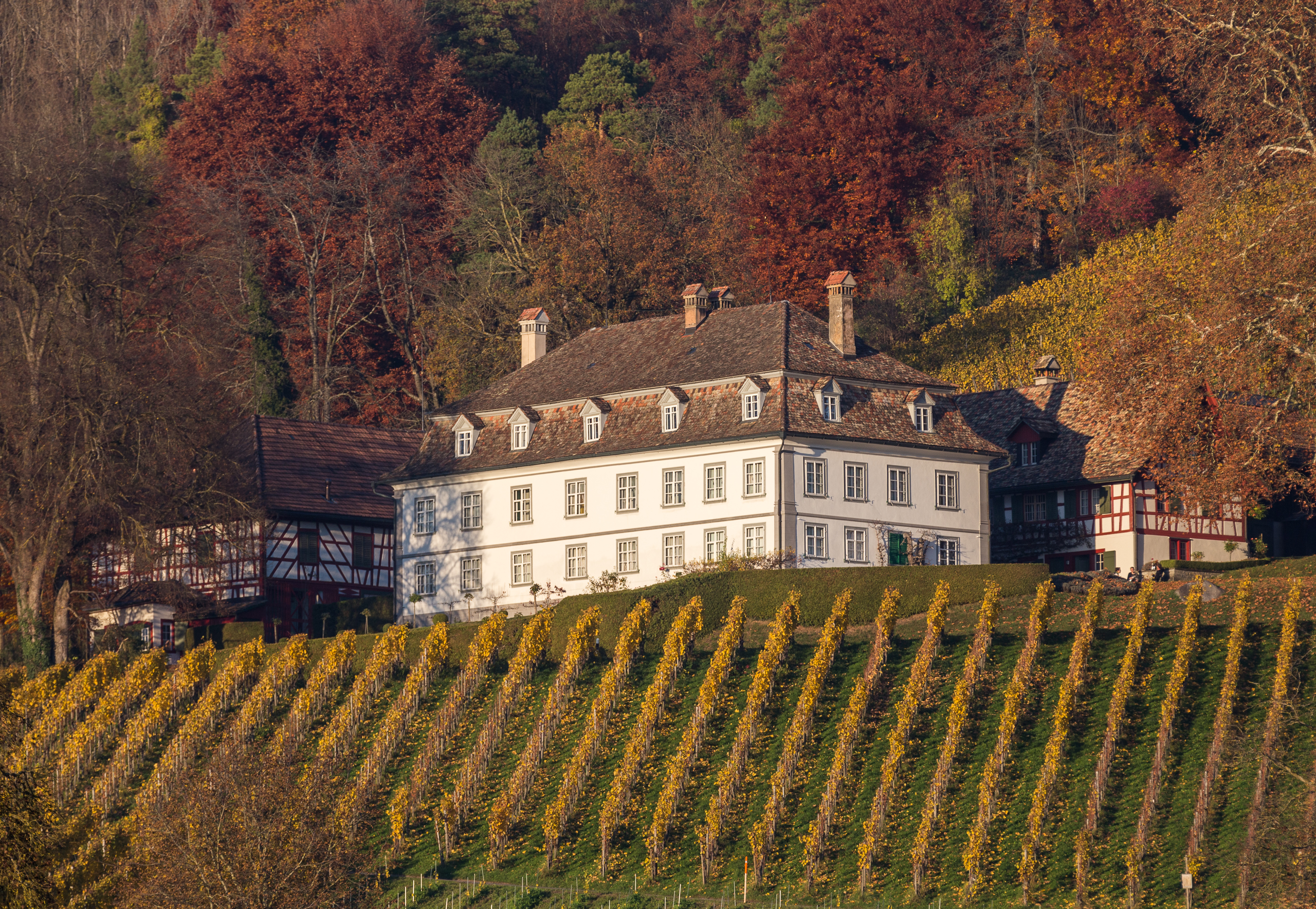 Schloss Bachtobel, herbstlich zwischen Wein und Wald